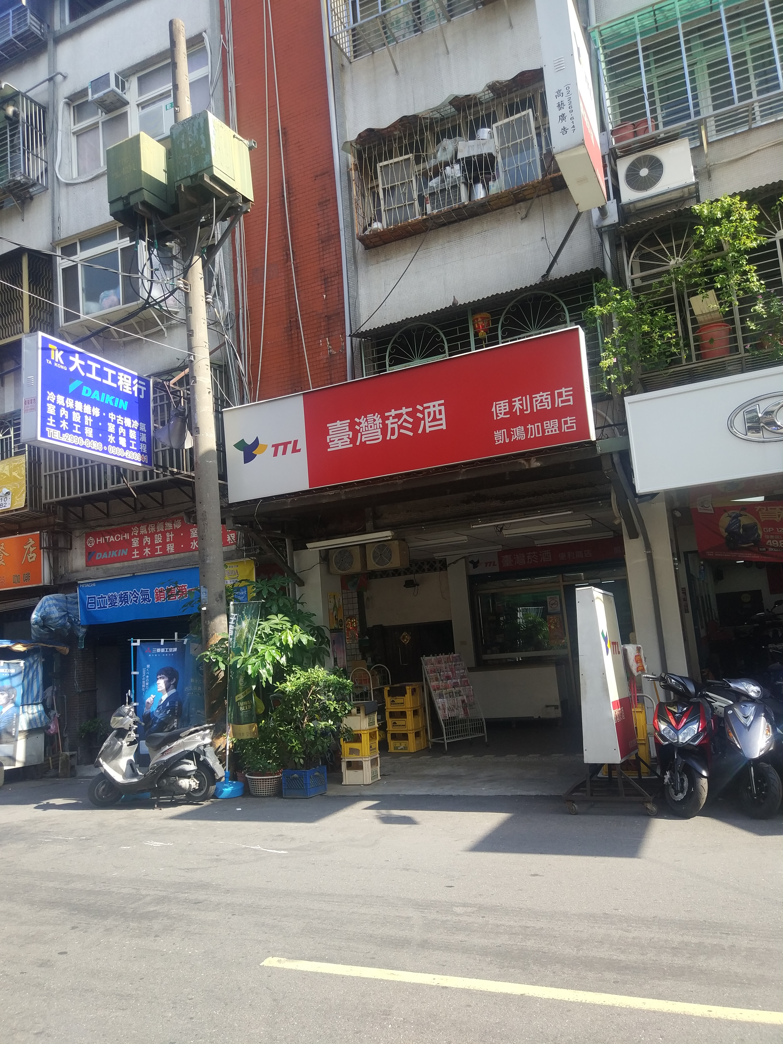 中文（台灣）: 新北市新莊區中誠街，臺灣菸酒便利商店凱鴻加盟店。